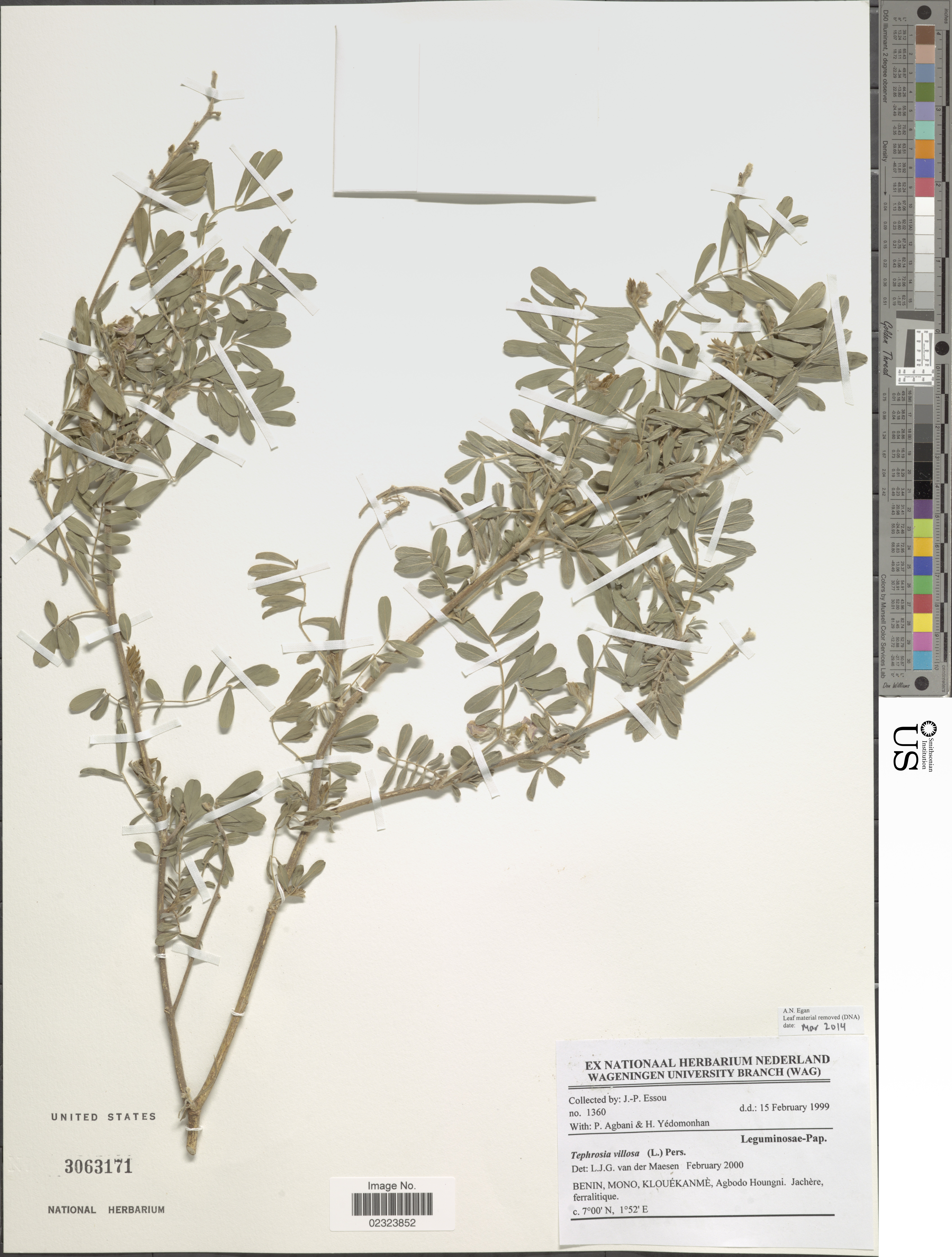 Tephrosia villosa Pers. Object Details Biogeographical Region 22 - West Tropical Africa Collector J. -. Essou P. Agbani H. Yedomonhan Record Last Modified 29 Dec 2017 Specimen Count 1 Collection Date 15 Feb 1999 Barcode 02323852 USNM Number 3063171 Place Klouékanme, Agbodo Houngni., Mono, Benin, Africa Published Name Tephrosia villosa Pers. Taxonomy Plantae Dicotyledonae Rosales Fabaceae Faboideae NMNH - Botany Dept. Record ID nmnhbotany_13369633 Usage of Metadata (Object Detail Text) CC0 GUID (Link to Original Record)